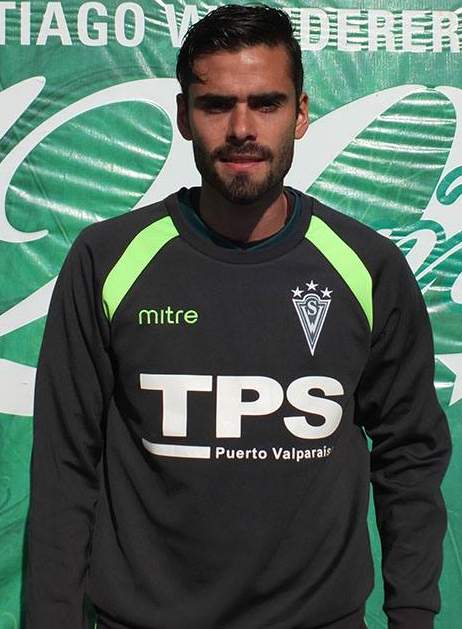 Edición de la fotografía "EzequielLuna.jpg", que muestra al jugador de fútbol Ezequiel Luna.